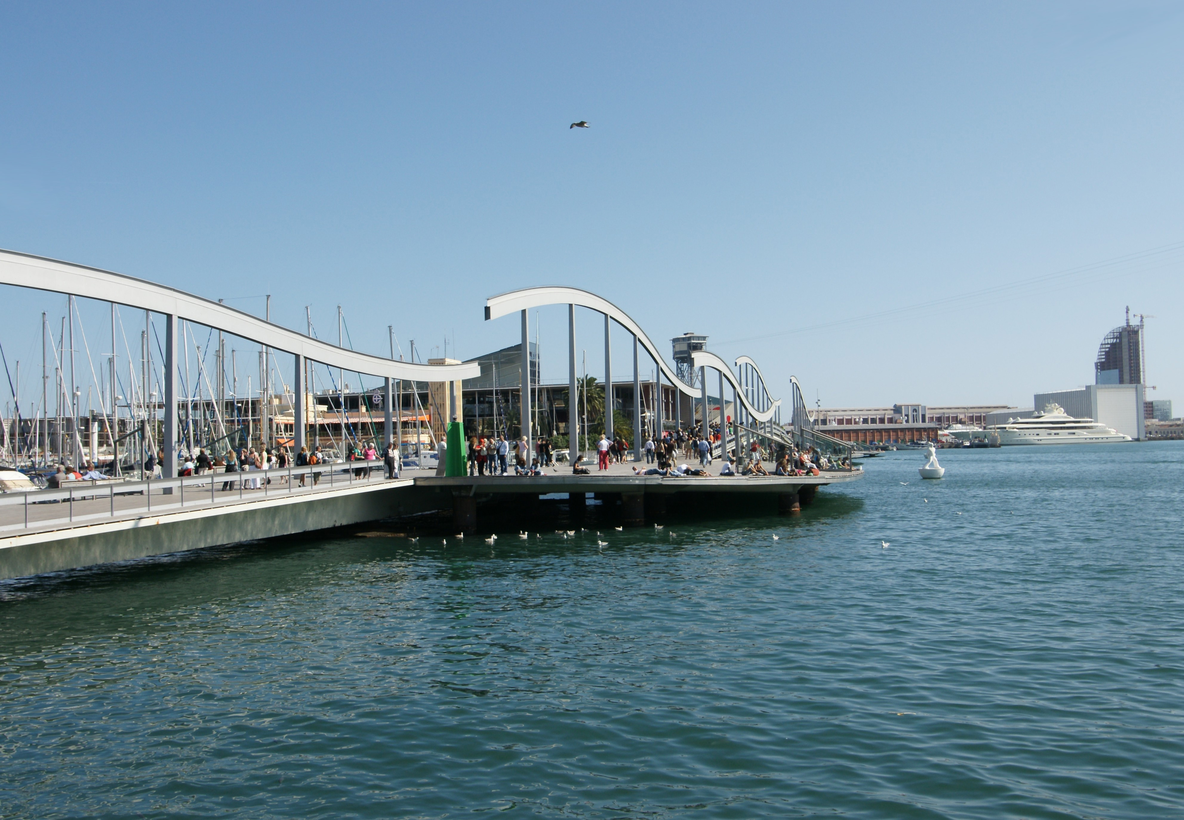 Das Hafengelände "Port Vell" im 1. Bezirk (Ciutat Vella) von Barcelona. Blick auf die "La Rambla de Mar". Rechts, das noch im Bau befindende "Hotel Vela von Ricardo Bofill".